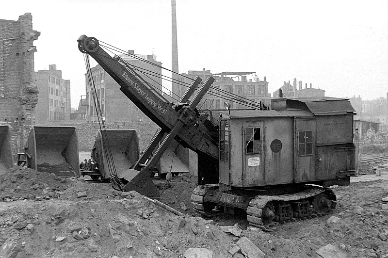 Original image description from the Deutsche Fotothek Blick auf eine Baustelle mit einem Bagger